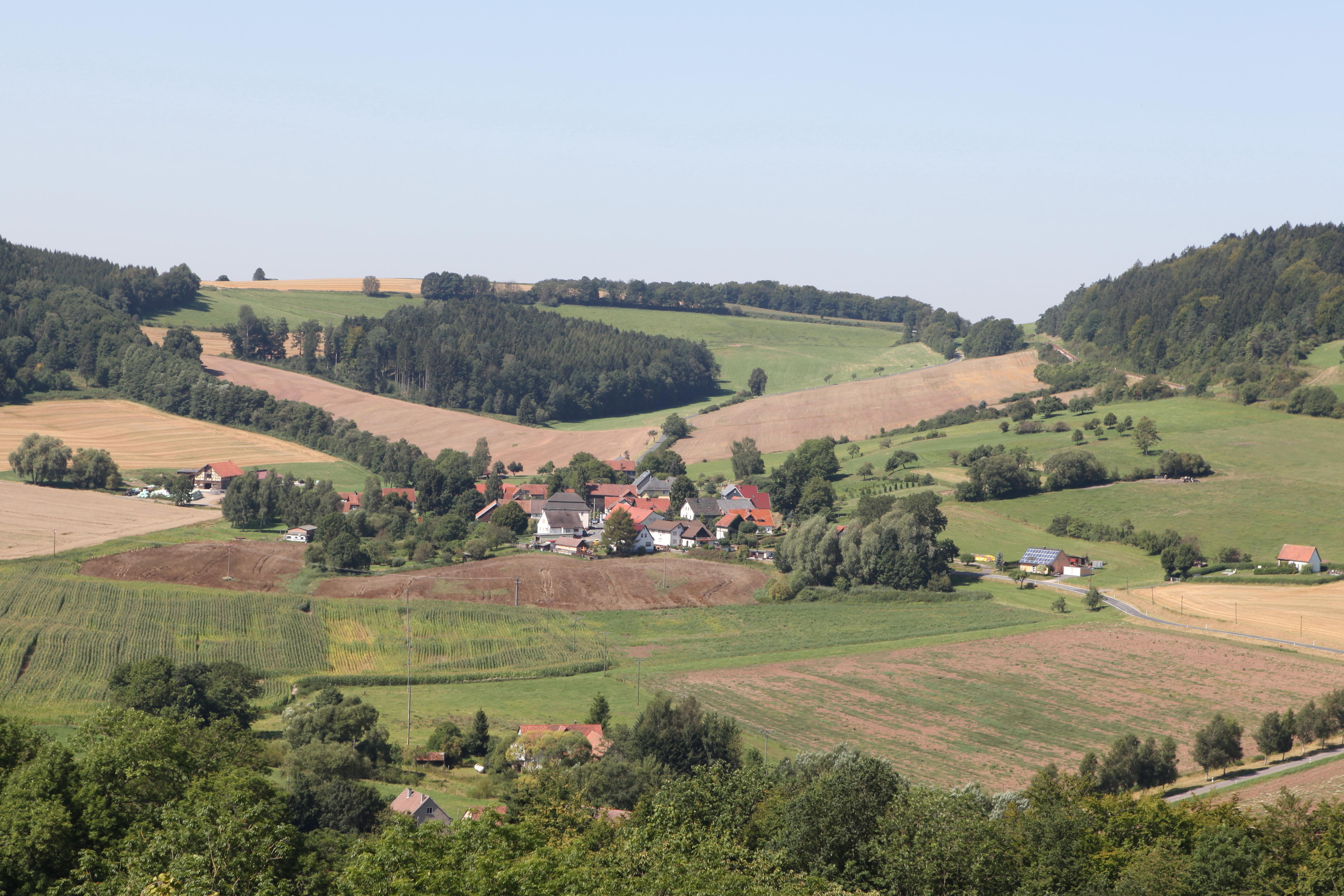 Katzberg, OT von Schalkau, im Landkreis Sonneberg